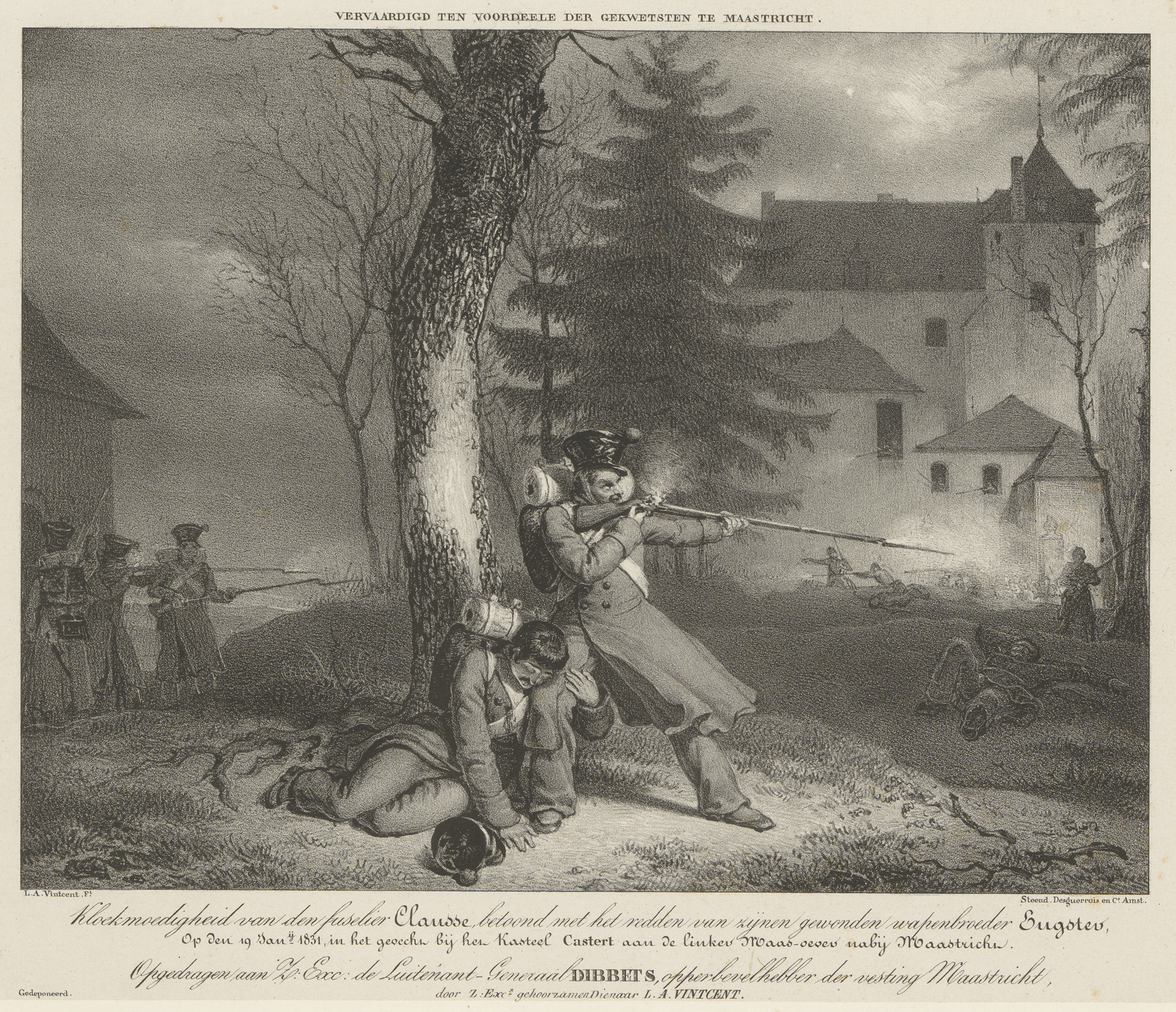 IdentificatieTitel(s): Heldendaad van fuselier ClausseKloekmoedigheid van den fuselier Clausse, betoond met het redden van zijnen gewonden wapenbroeder Engster, Op den 19 Jan.ij 1831, in het gevecht bij het Kasteel Castert aan de linker Maas-oever nabij Maastricht (titel op object)Objecttype: prent Objectnummer: RP-P-OB-29.923Catalogusreferentie: FMH 6600Opschriften / Merken: verzamelaarsmerk, verso, gestempeld: Lugt 2228Omschrijving: De Nederlandse fuselier Clausse verdedigt zich bij een boom tegen de naderende Belgische troepen, aan zijn voeten ligt de gewonde Engster, in de achtergrond het kasteel Caestert.VervaardigingVervaardiger: prentmaker: Lodewijk Anthony Vintcentnaar ontwerp van: Lodewijk Anthony Vintcent (vermeld op object)drukker: Desguerrois & Co. (vermeld op object)opgedragen door: Lodewijk Anthony Vintcent (vermeld op object)opgedragen aan: Bernardus Johannes Cornelis baron Dibbets (vermeld op object)Plaats vervaardiging: AmsterdamDatering: in of na 1831Fysieke kenmerken: lithografie op chine colléMateriaal: papier chine collé Techniek: lithografie (techniek)Afmetingen: blad: h 307 mm × b 348 mmOnderwerpWat: small groups in single combat in place of battleBelgische RevolutieWaar: Kasteel CaestertVerwerving en rechtenVerwerving: onbekend 2017Copyright: Publiek domein